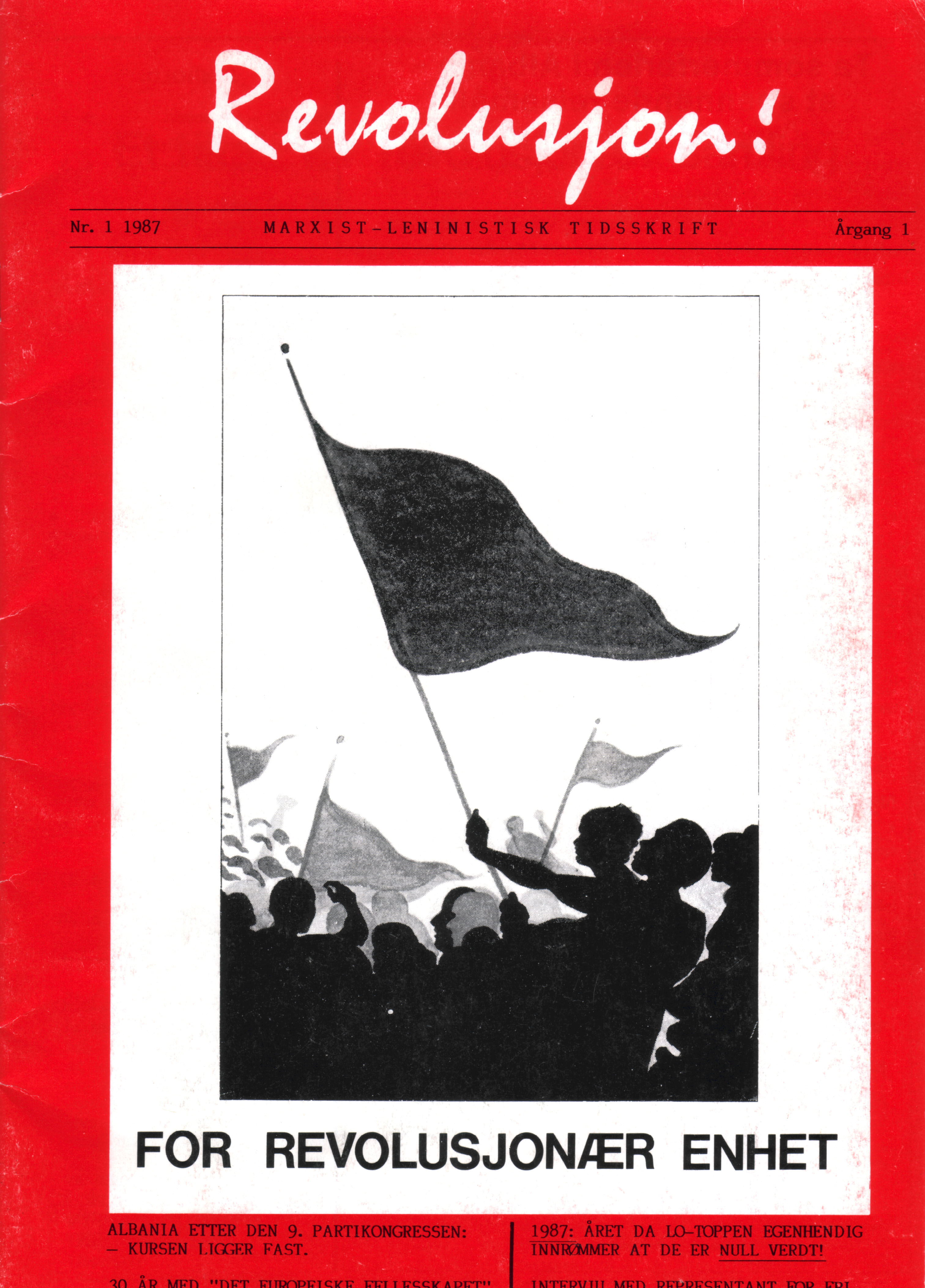 Førsteutgaven av tidsskriftet Revolusjon. Mai 1987.